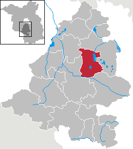 Am Mellensee in Brandenburg (Country) - District Teltow-Fläming